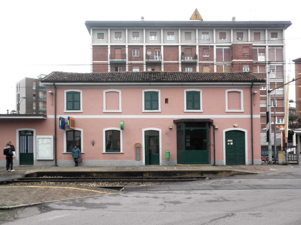 Stazione ferroviaria di Cormano-Brusuglio